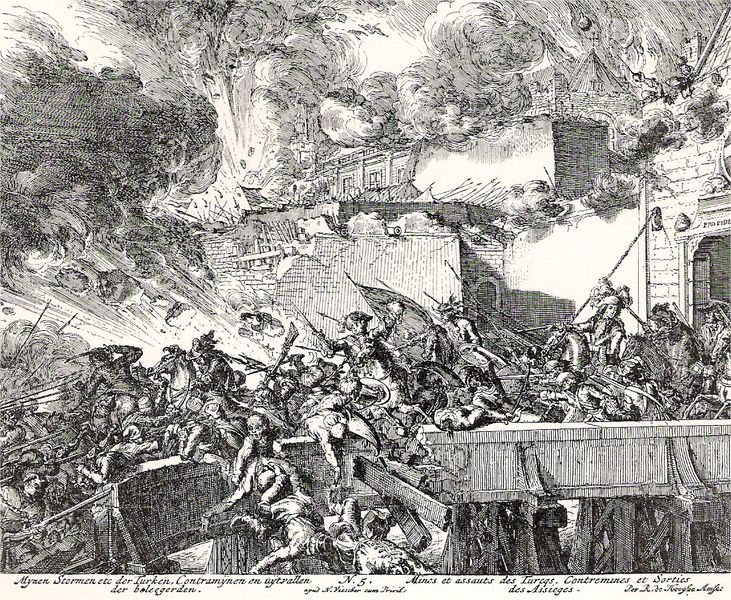 2. Wiener Türkenbelagerung; Türkische Mine und Ausfall der Belagerten. Radierung von Roman de Hooghe aus "Relation succinte et veritable ... faite par G. V. Ghelen"